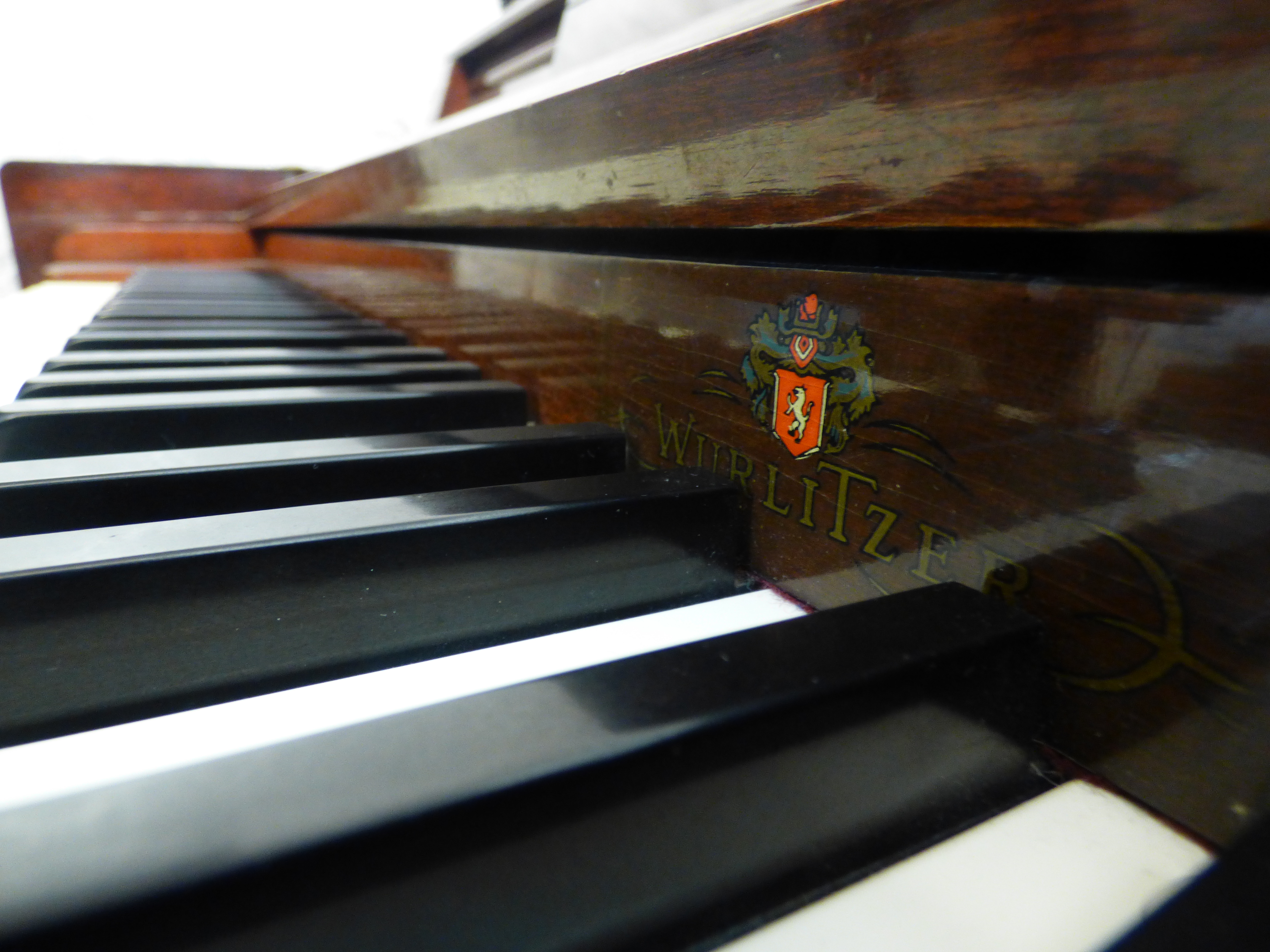 Detalle de piano Wurlitzer